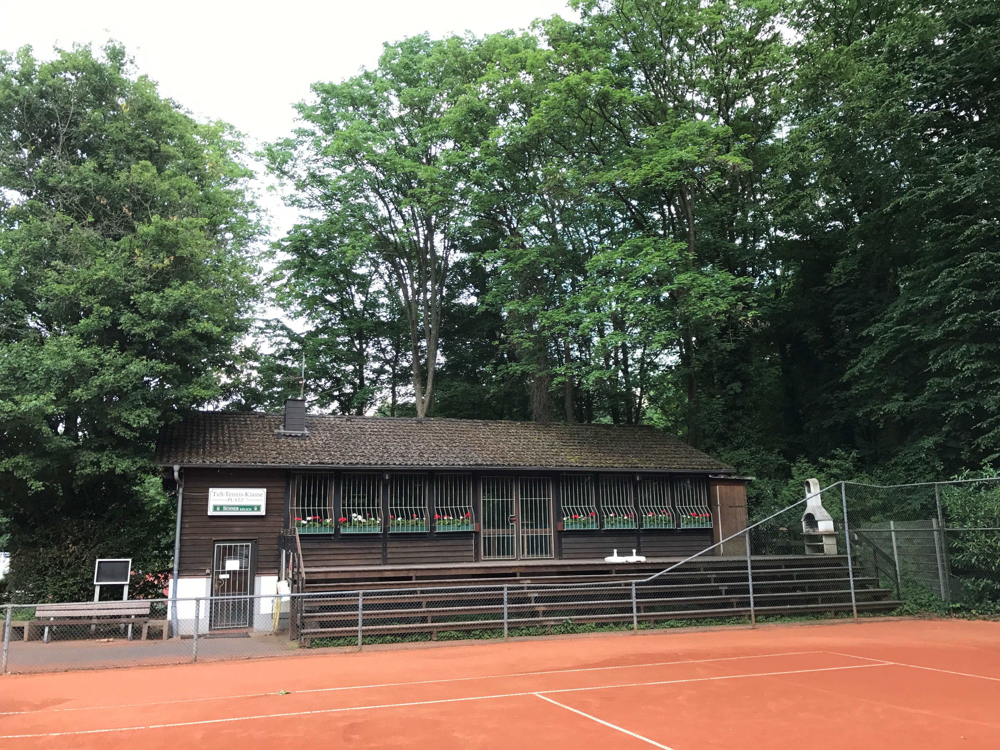 Das TuS Tennisheim